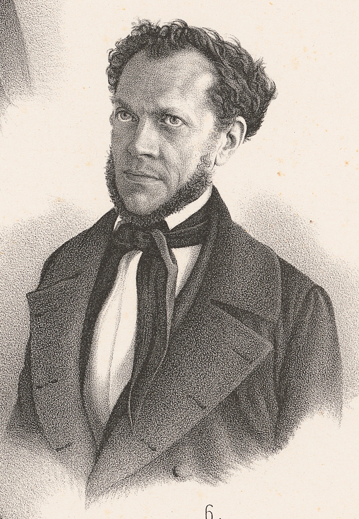 Karl Gustav Geib (1808-1864), deutscher Jurist